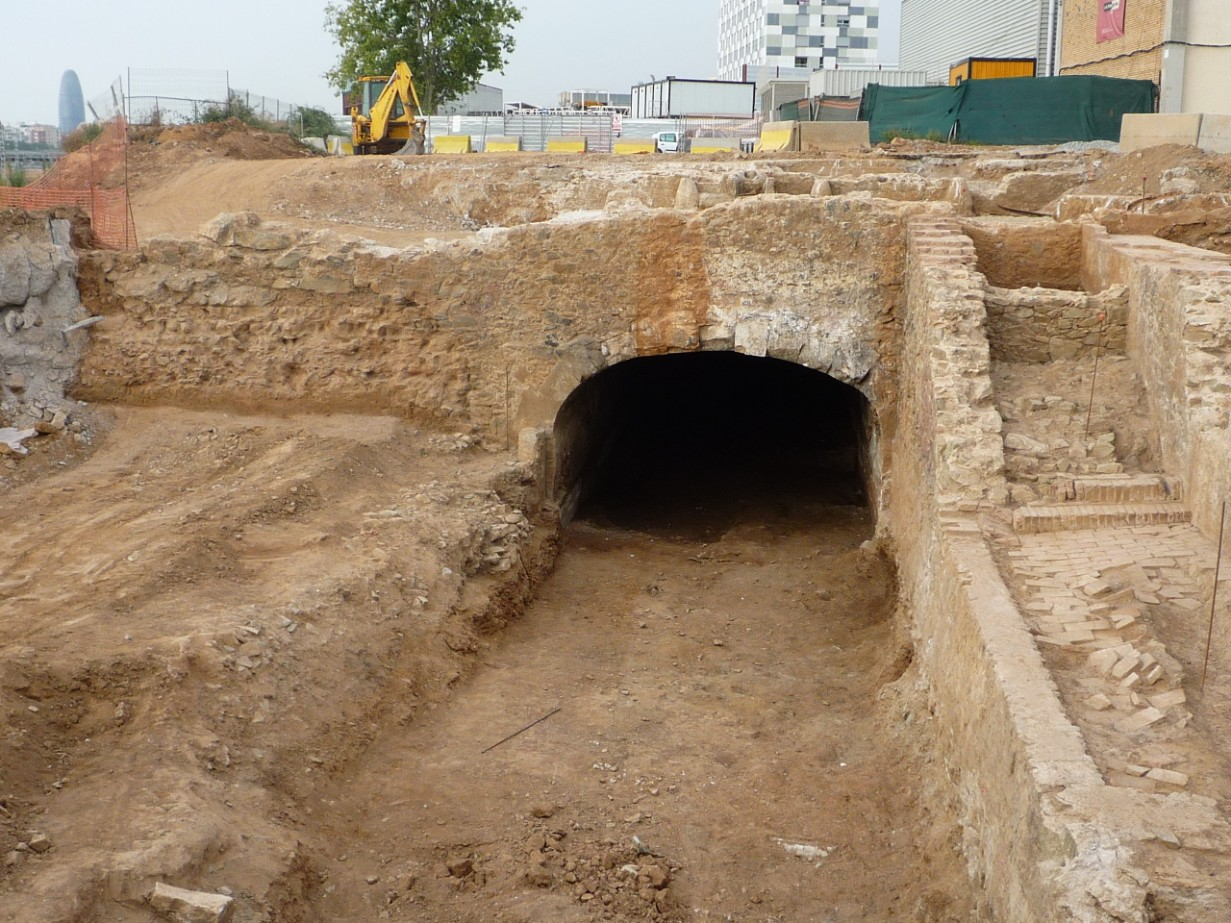 Vista frontal del pont del carrer de la Riera d'Horta que creua el Rec Comtal. Foto: Estíbaliz Monguiló